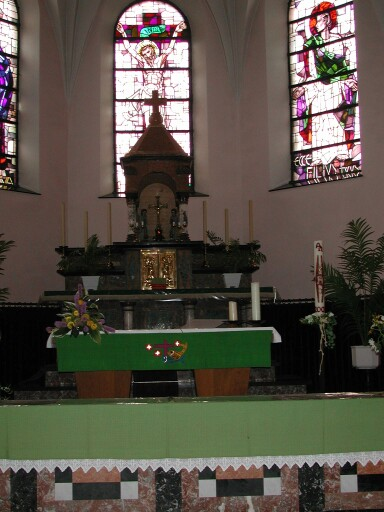 vue du coeur de l'église de Maldingen